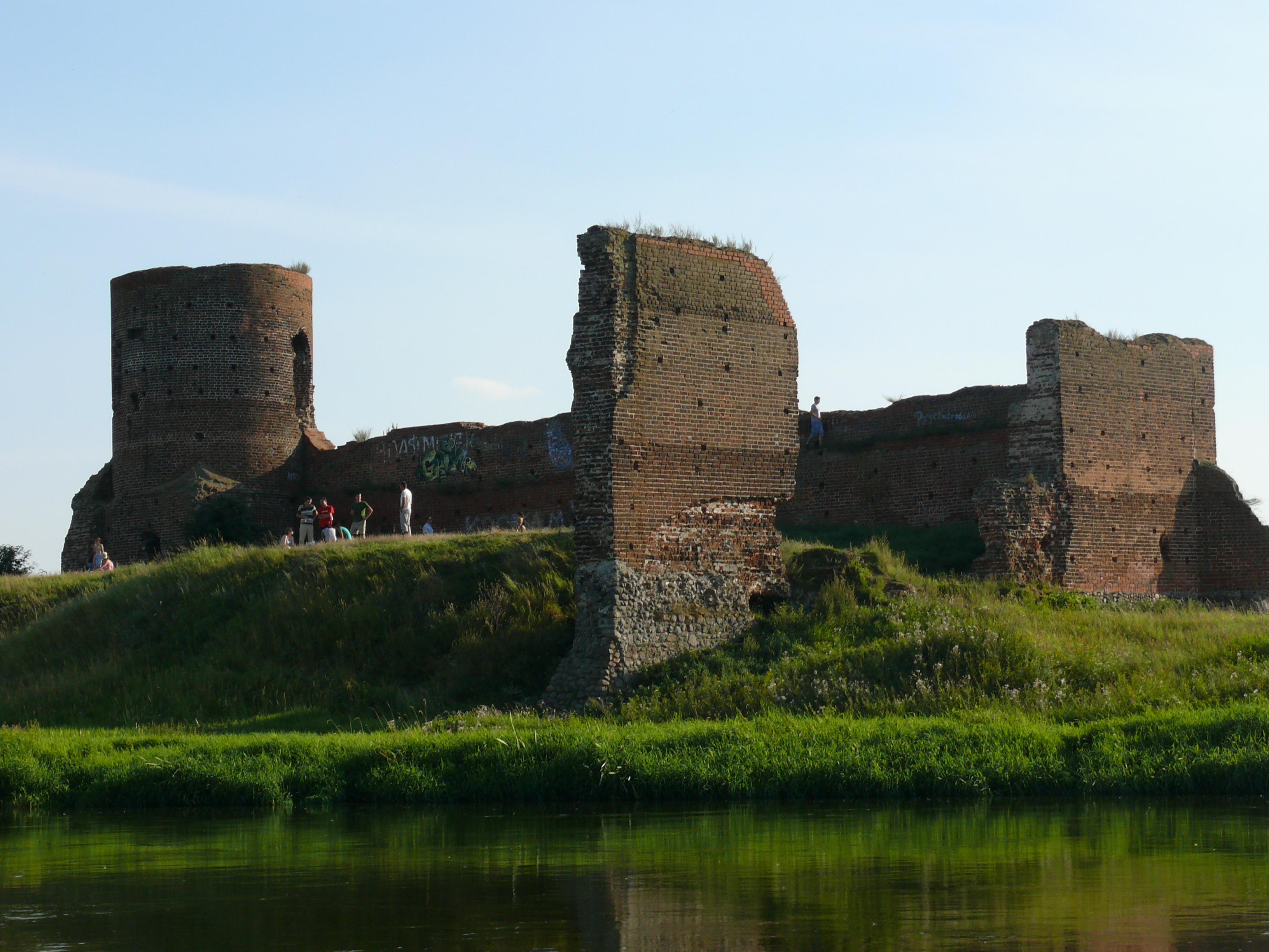 Ruiny zamku w Kole